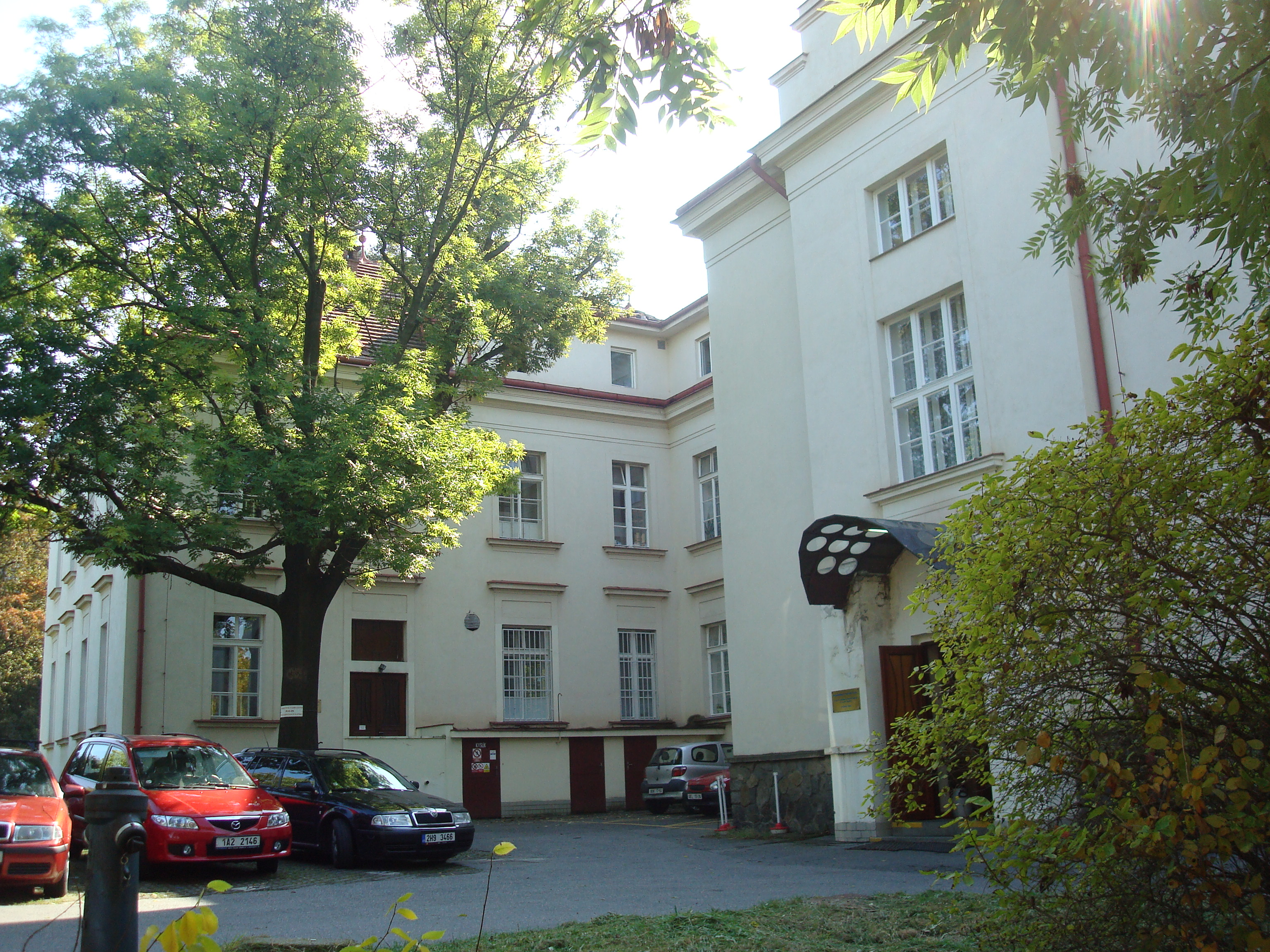 Psychiatrické centrum Praha sídlilo v areálu Psychiatrické léčebny v Bohnicích v pavilonech č. 19 a 23.